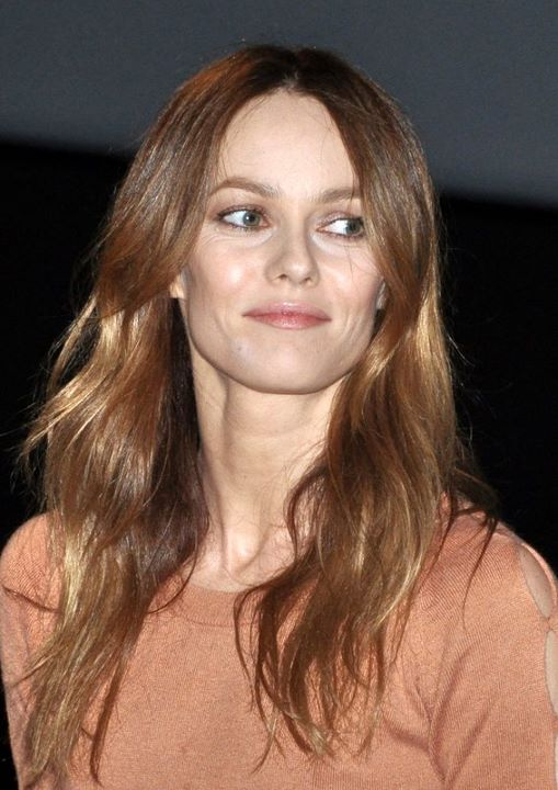 Vanessa Paradis à l'avant-première de Café de flore.